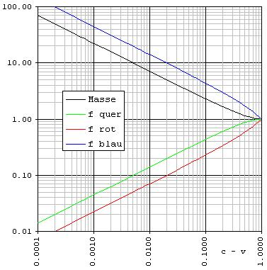 Relativistischer Dopplereffekt und Geschwindigkeit Für Computer geeignete Schreibweise der Gleichung: f=QWURZEL(1-(v/c)^2)/(1-(v/c)*COS(Winkelgrade*ARCTAN(1)/45)) c-v ist die auf die Lichtgeschwindigkeit fehlende Geschwindigkeit, masse (schwarz) ist der Faktor um den sich die Masse erhöht, f quer (grün) ist der Faktor um den sich die Frequenz verändert, wenn man genau von der Seite hinsieht, f rot ist von hinten gesehen, und f blau ist von vorne gesehen. Externer Link